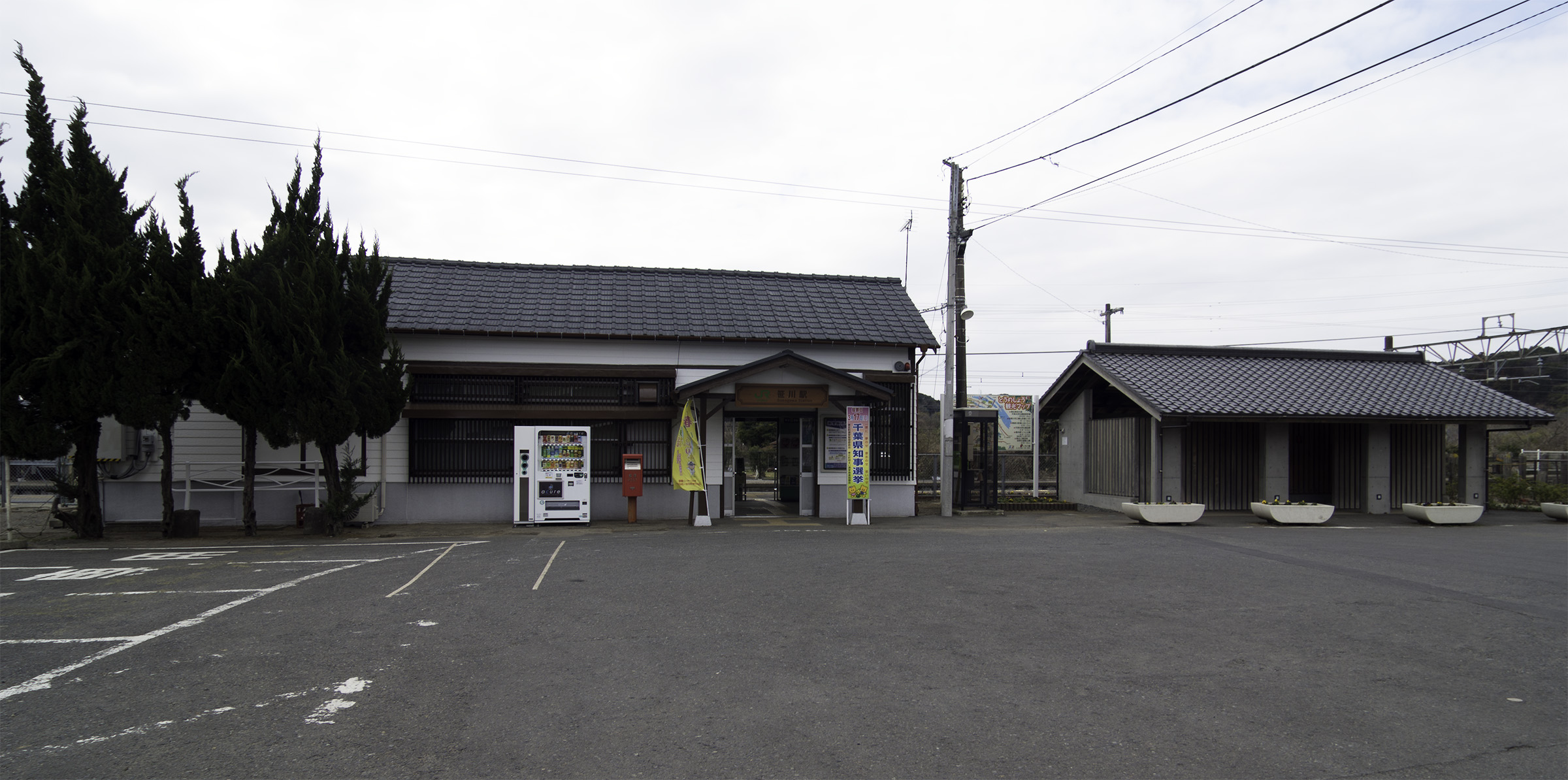 東日本旅客鉄道株式会社成田線笹川駅駅舎（リニューアル後）